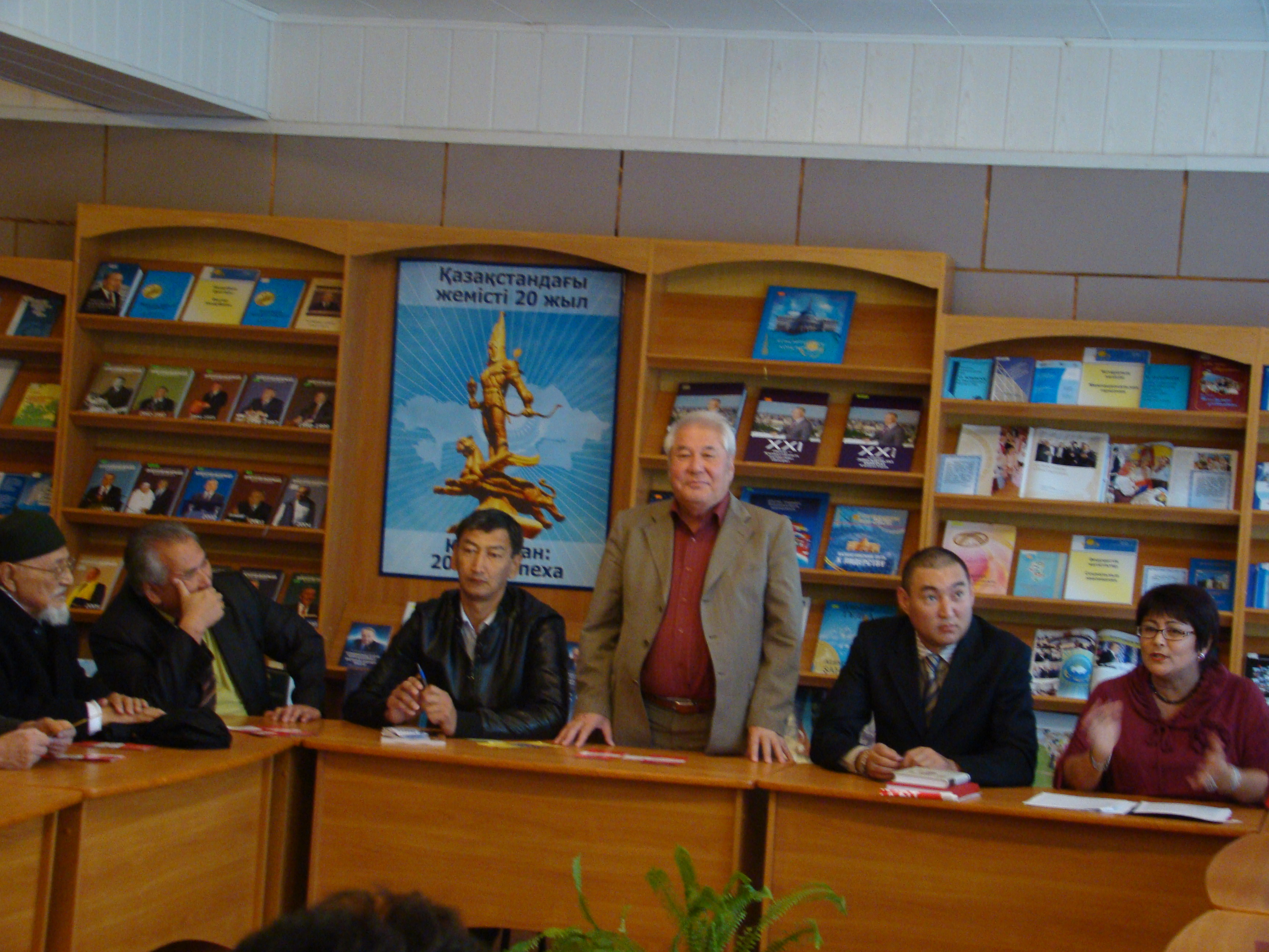 Отдел выставочно-массовой работы (Костанайская областная универсальная научная библиотека им. Л. Н. Толстого)